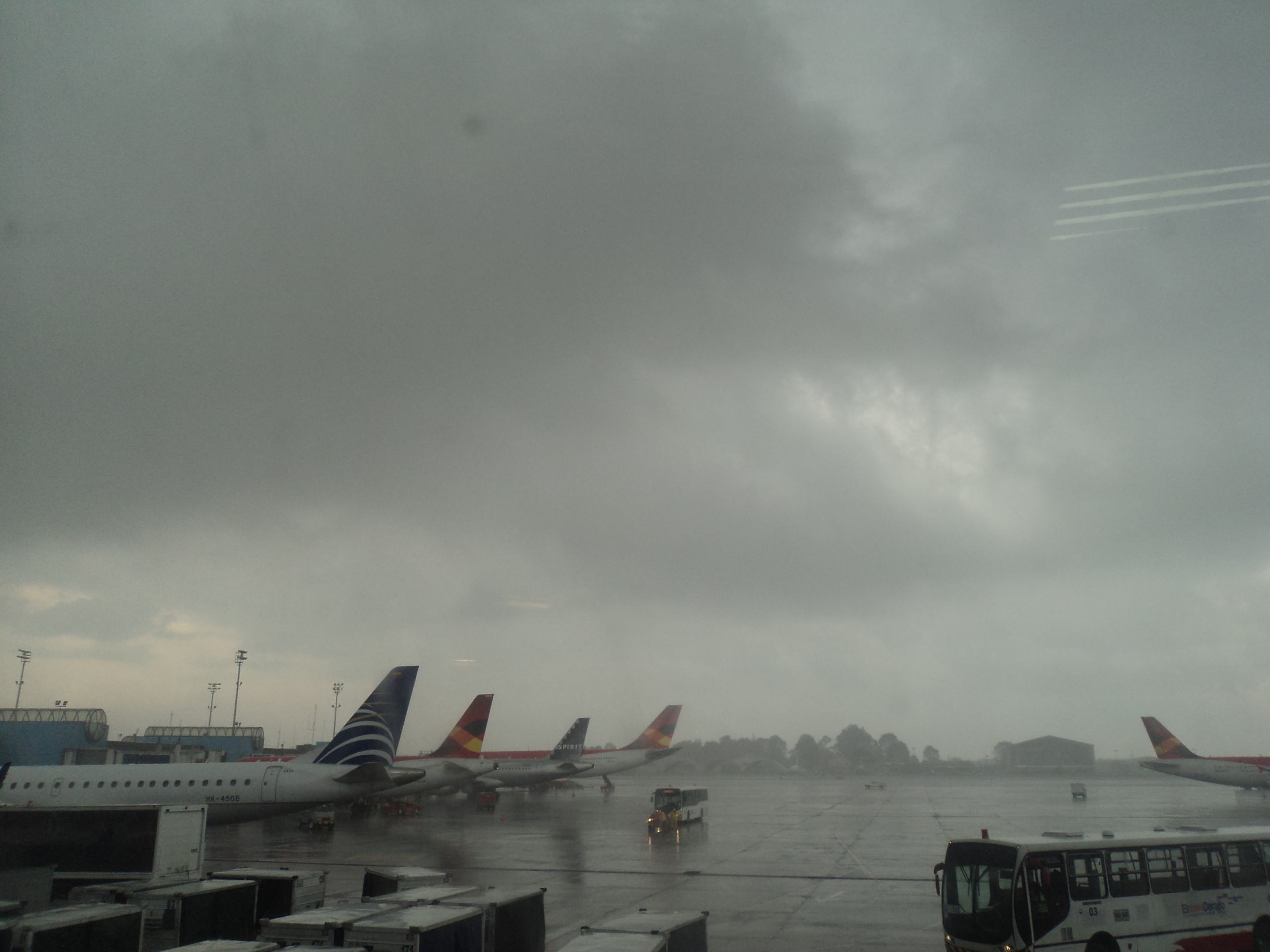 Aeropuerto " El Dorado " Bogota